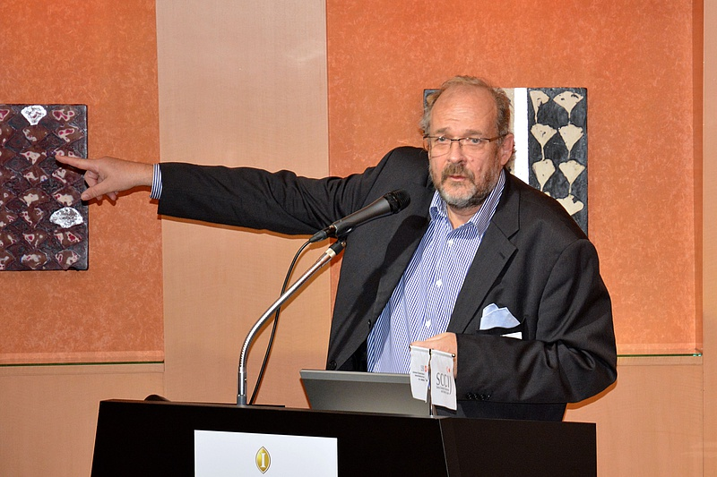 Elmar Mock, Switzerland 2017